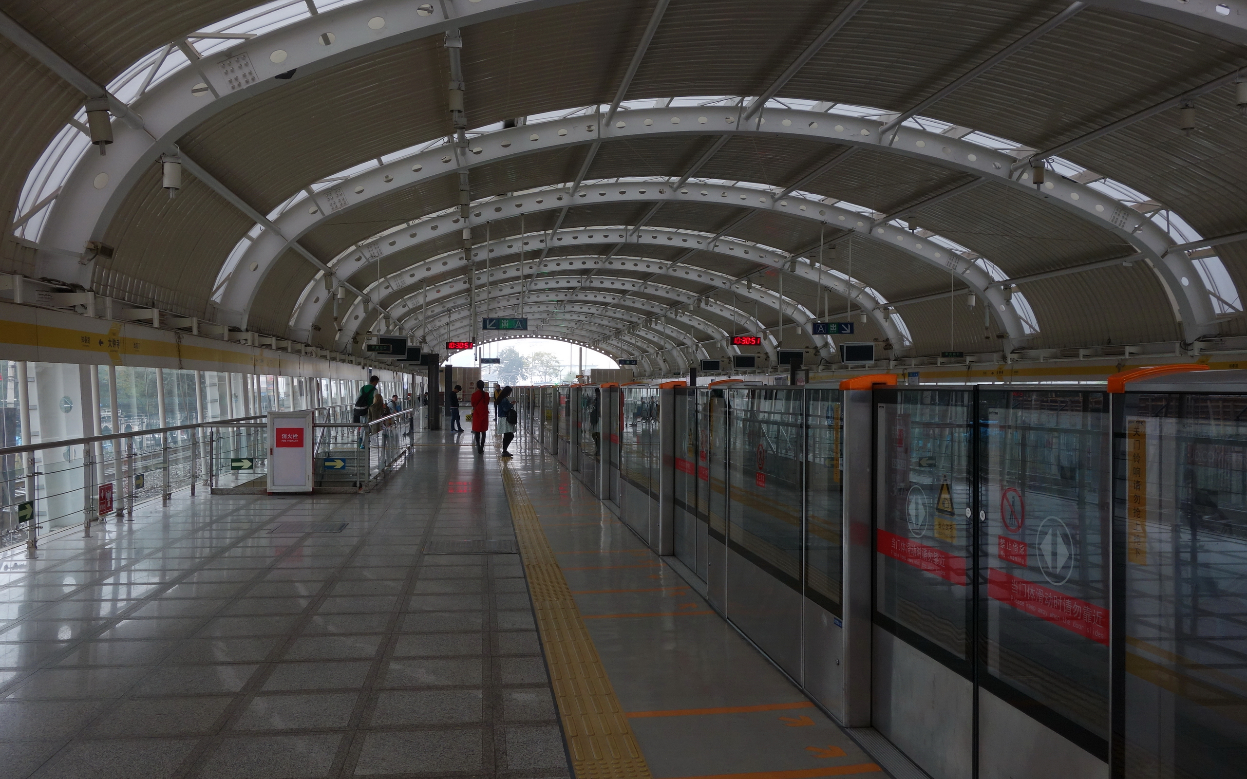 北京地铁13号线大钟寺站站台，站台加装半高屏蔽门已于2015年正式投入运行。